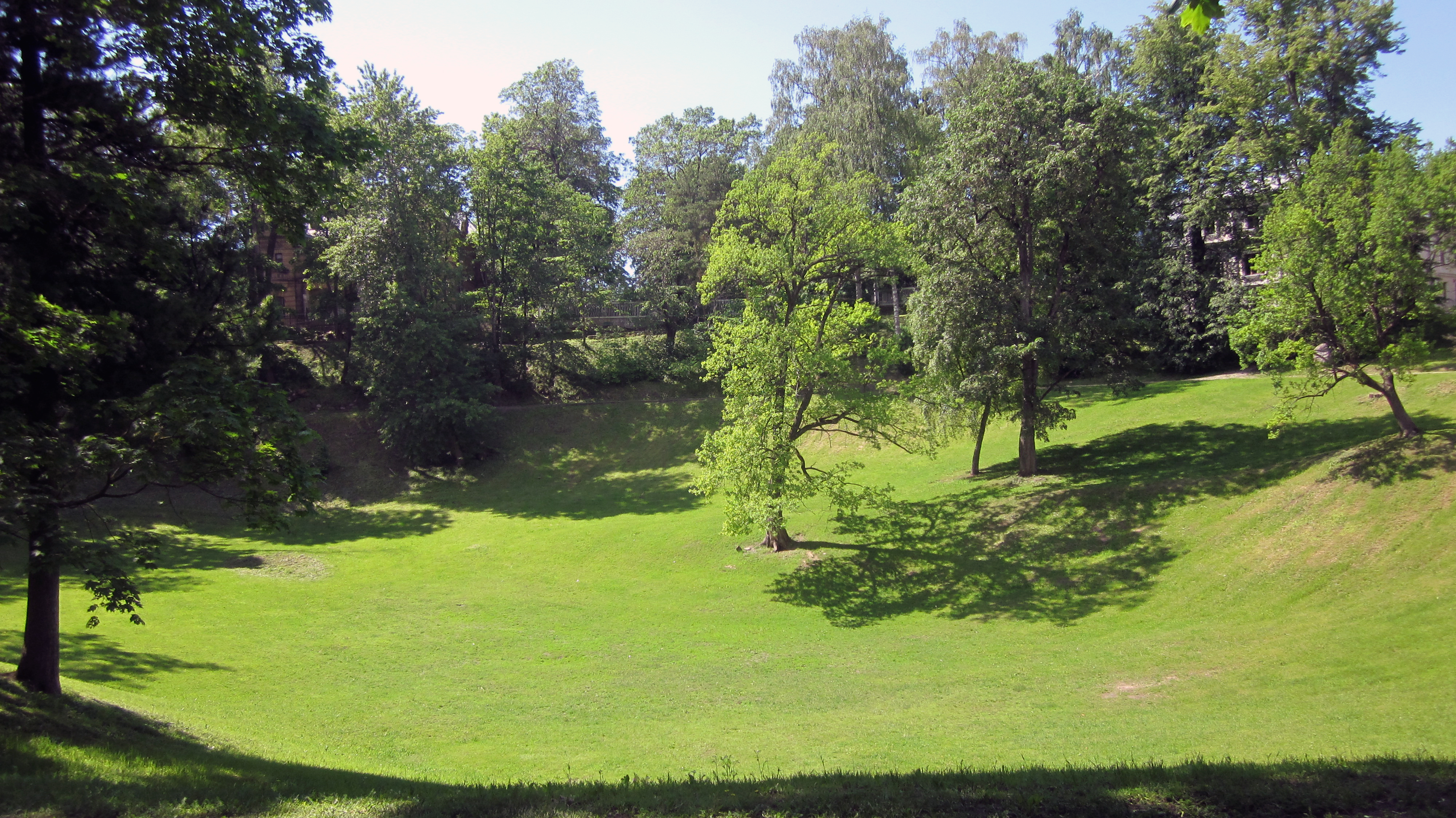 Tartu, vaade K. E. Baeri tänavalt läänesuunas